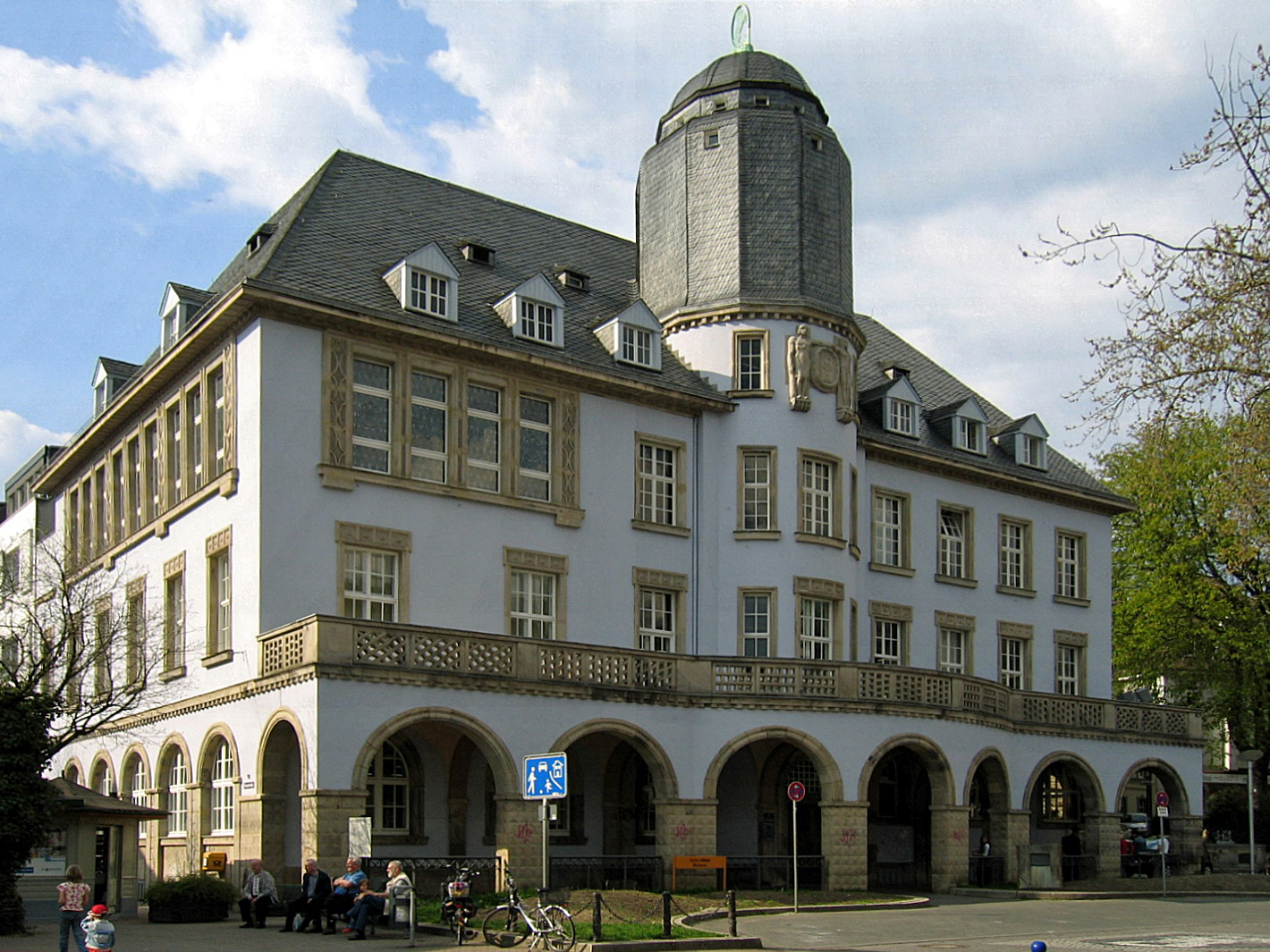 Unter Denkmalschutz stehendes "Altes Rathaus" (1912) mit Mittelturm und Laubengang mit Rundbögen in Menden (Sauerland).